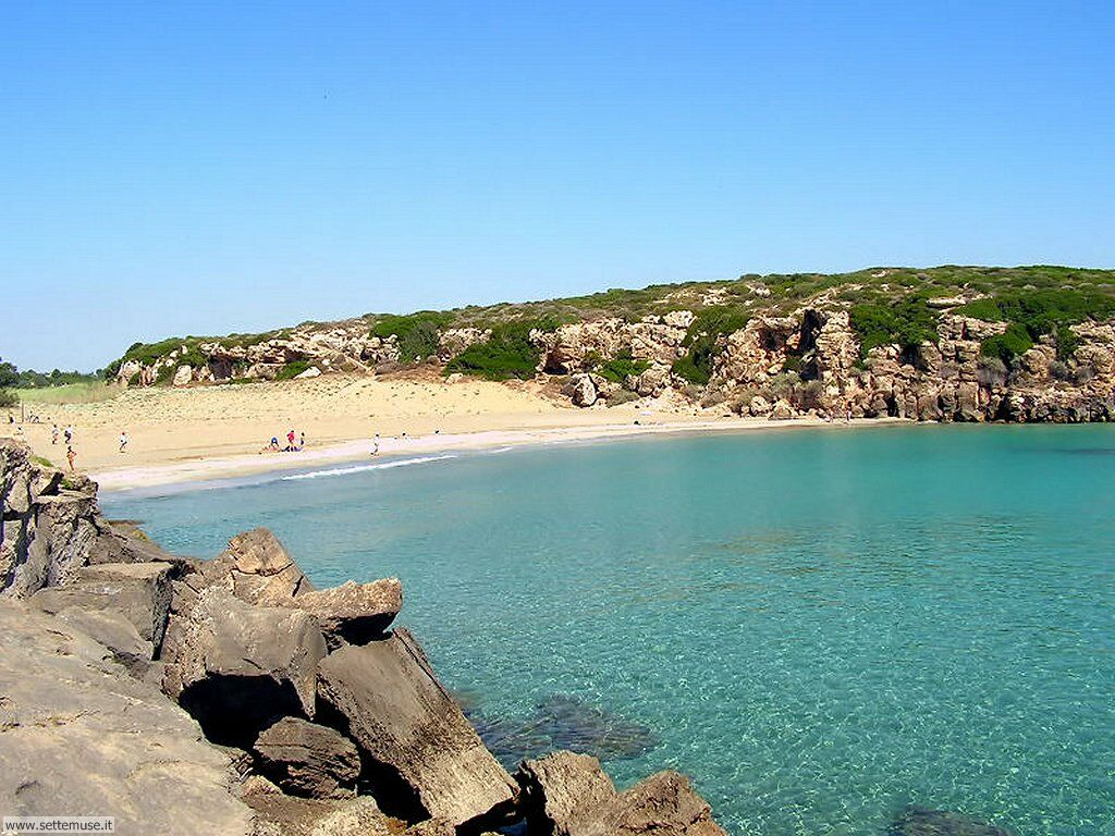 Spiaggia di Calamosche